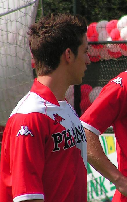 Belgisch voetballer Dries Mertens in het tenue van FC Utrecht